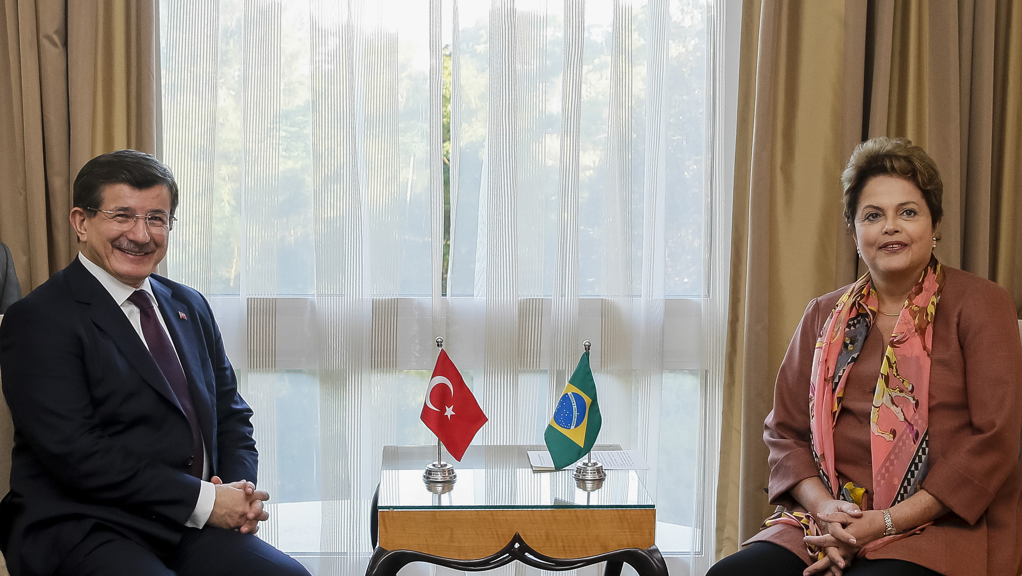 Brisbane - Austrália,14/11/2014. Presidenta Dilma Rousseff durante encontro bilateral com Primeiro-ministro da Turquia, Ahmet Davutoglu. Foto: Roberto Stuckert Filho/PR